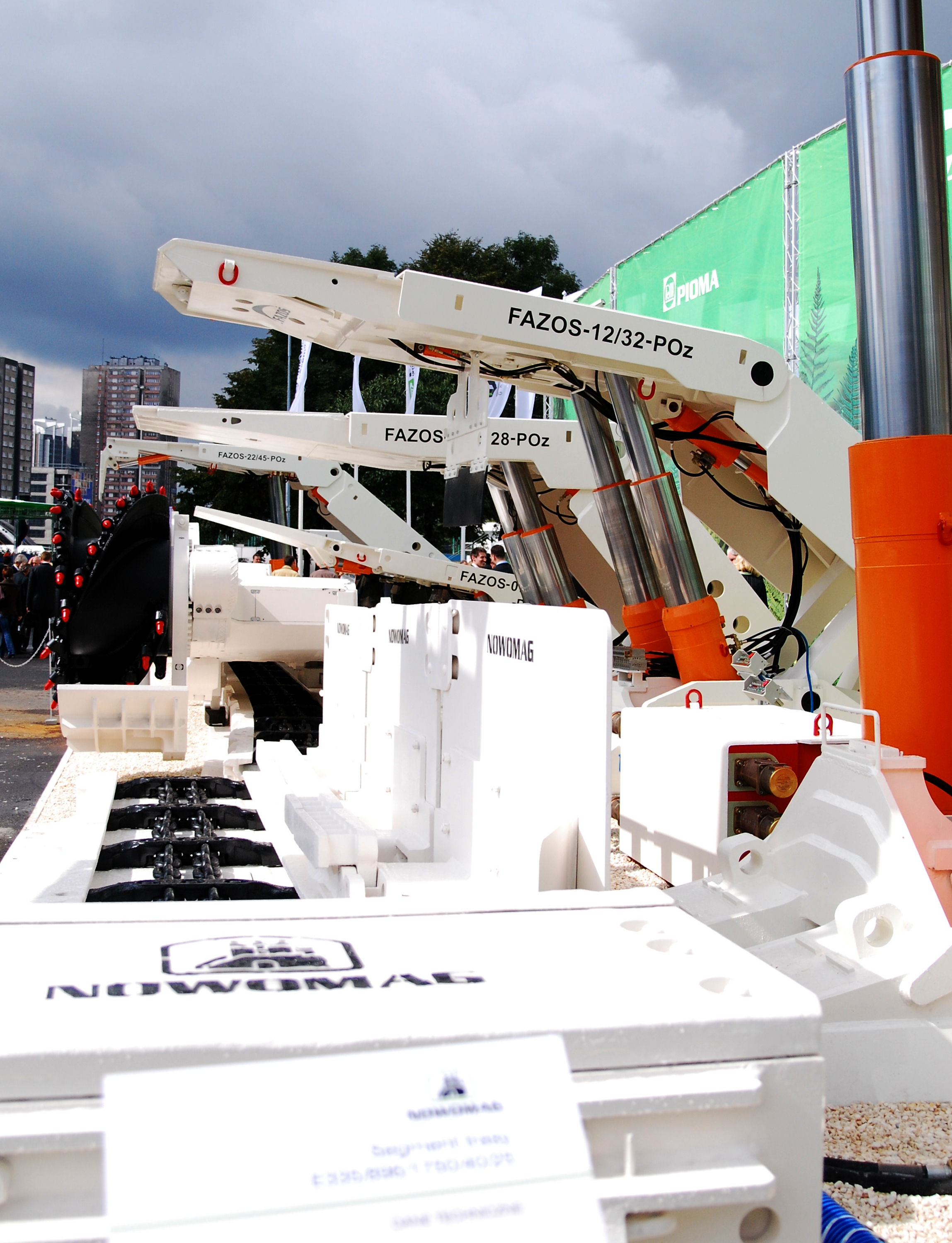 Urządzenie górnicze zdjęcie wykonane podczas Międzynarodowych Targów Górnictwa, Przemysłu Energetycznego i Hutniczego w Katowicach w Spodku